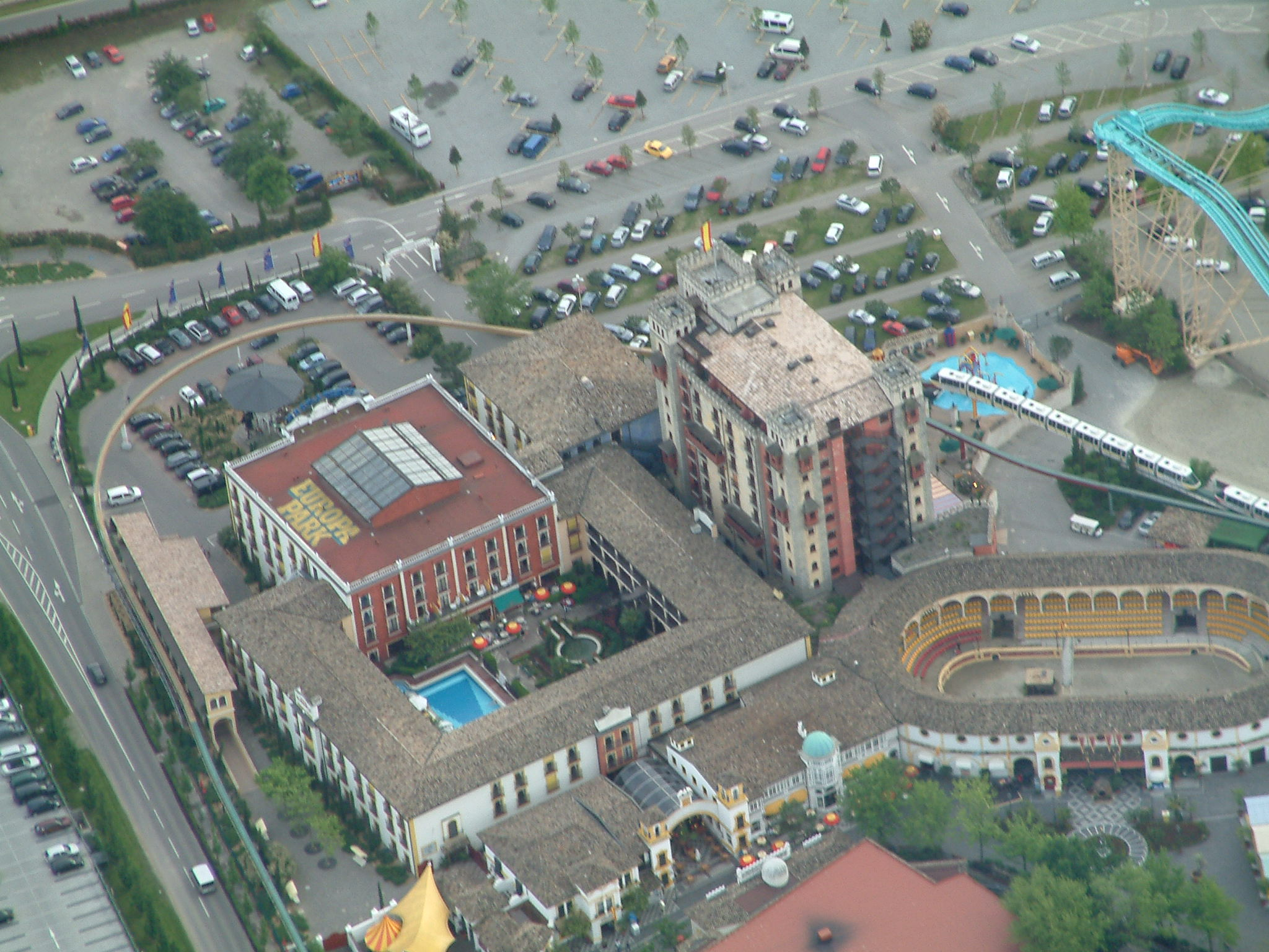 Europa-Park in Rust, Germany, Hotel Castillo Alcazar und Hotel El Andaluz